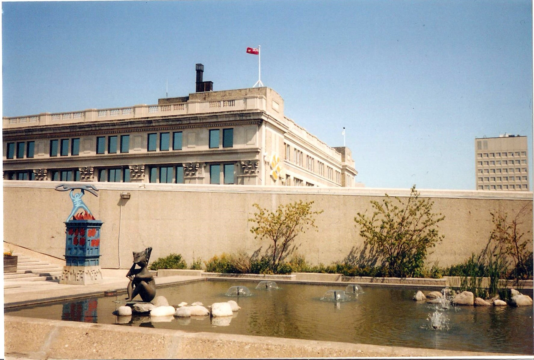 Winnipeg, Manitoba